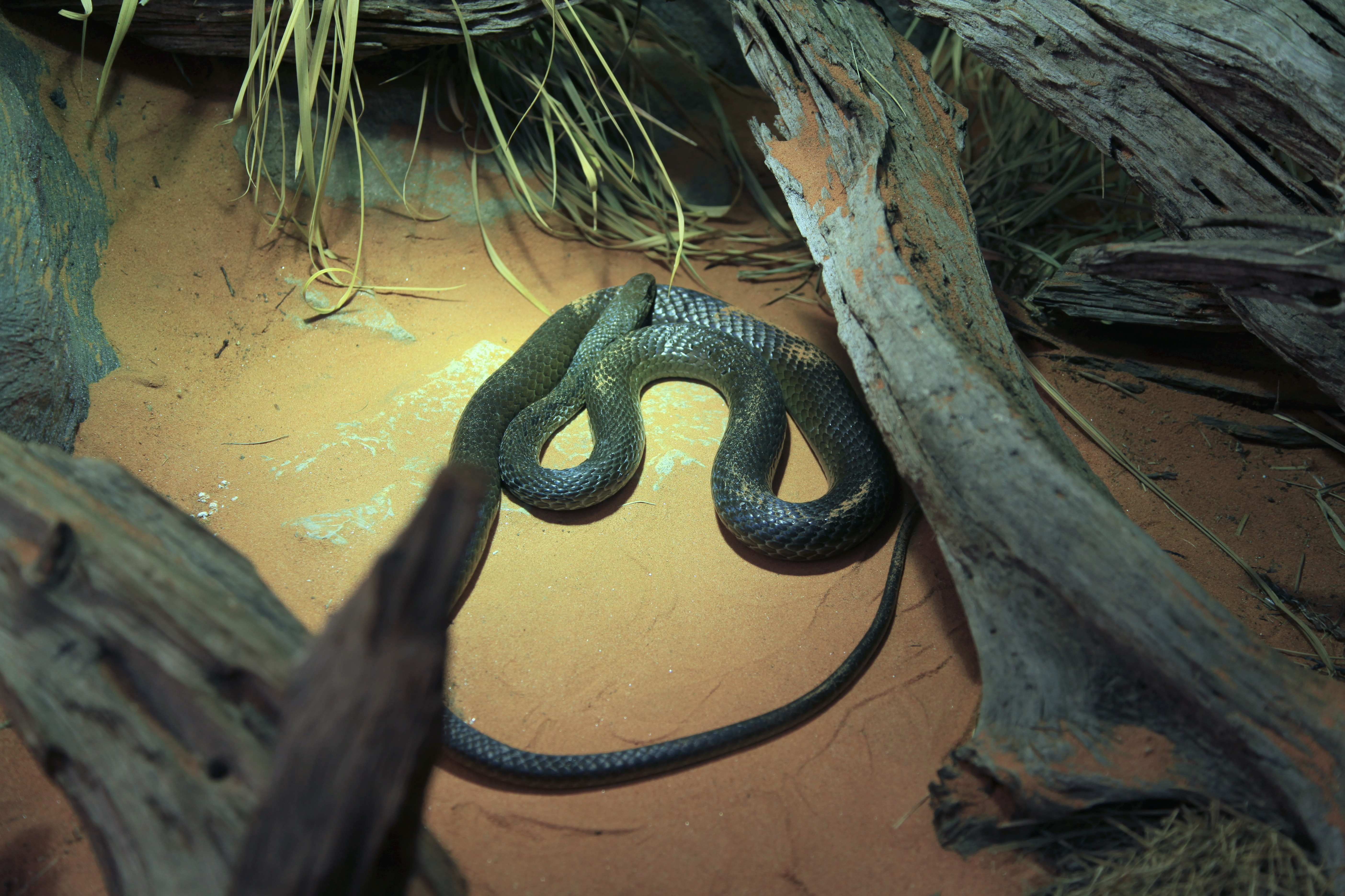 Psammophis mossambicus im Zoo in Dortmund